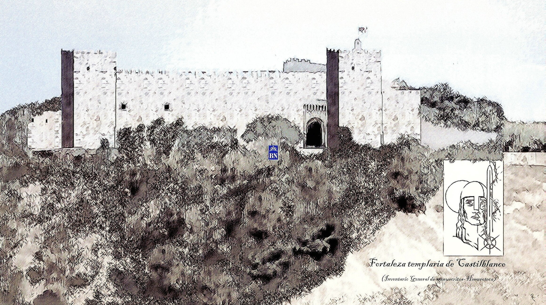 Grabado de la fortaleza templaria de Castilblanco (Badajoz)